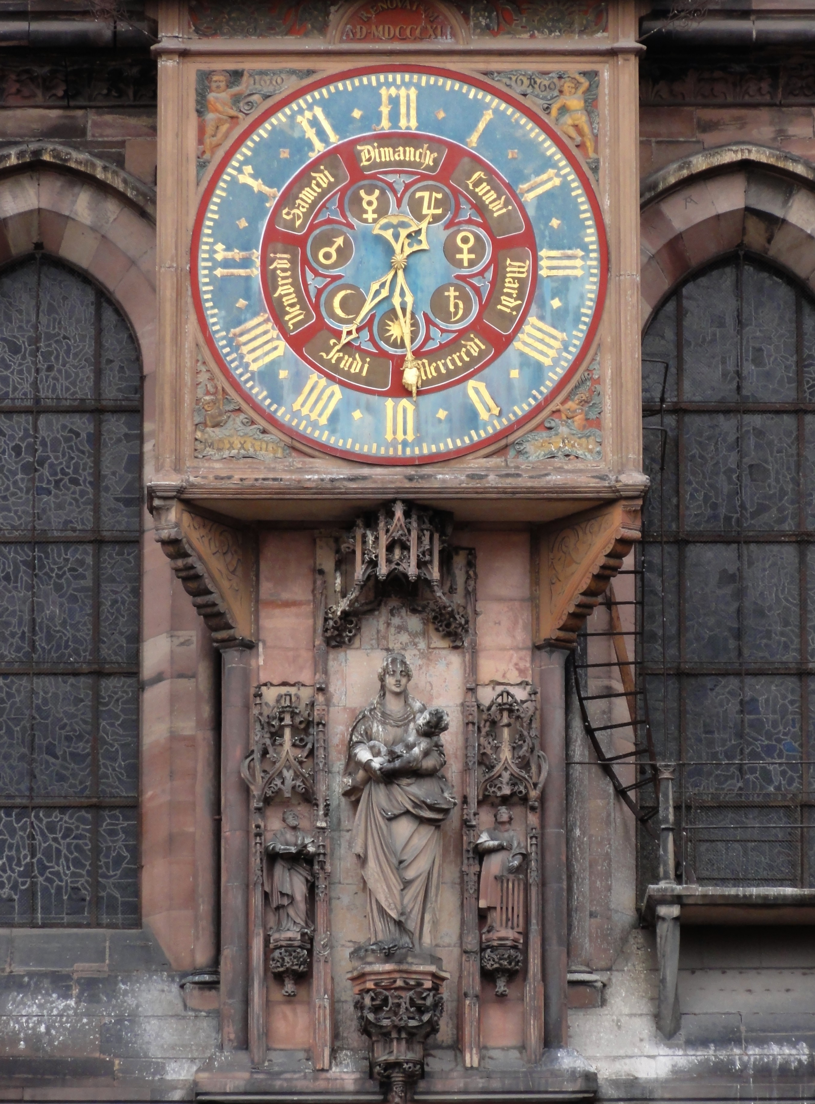 Alsace, Bas-Rhin, Cathédrale Notre-Dame de Strasbourg (PA00085015).Façade du transept sud, Cadran de l'horloge et statues gothiques